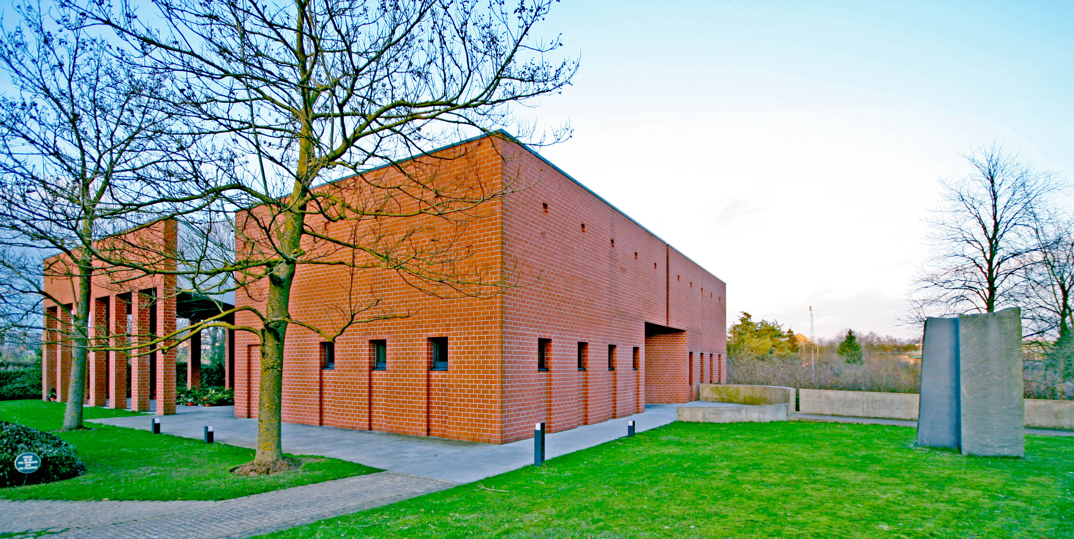 Krematorium zu Hamm.